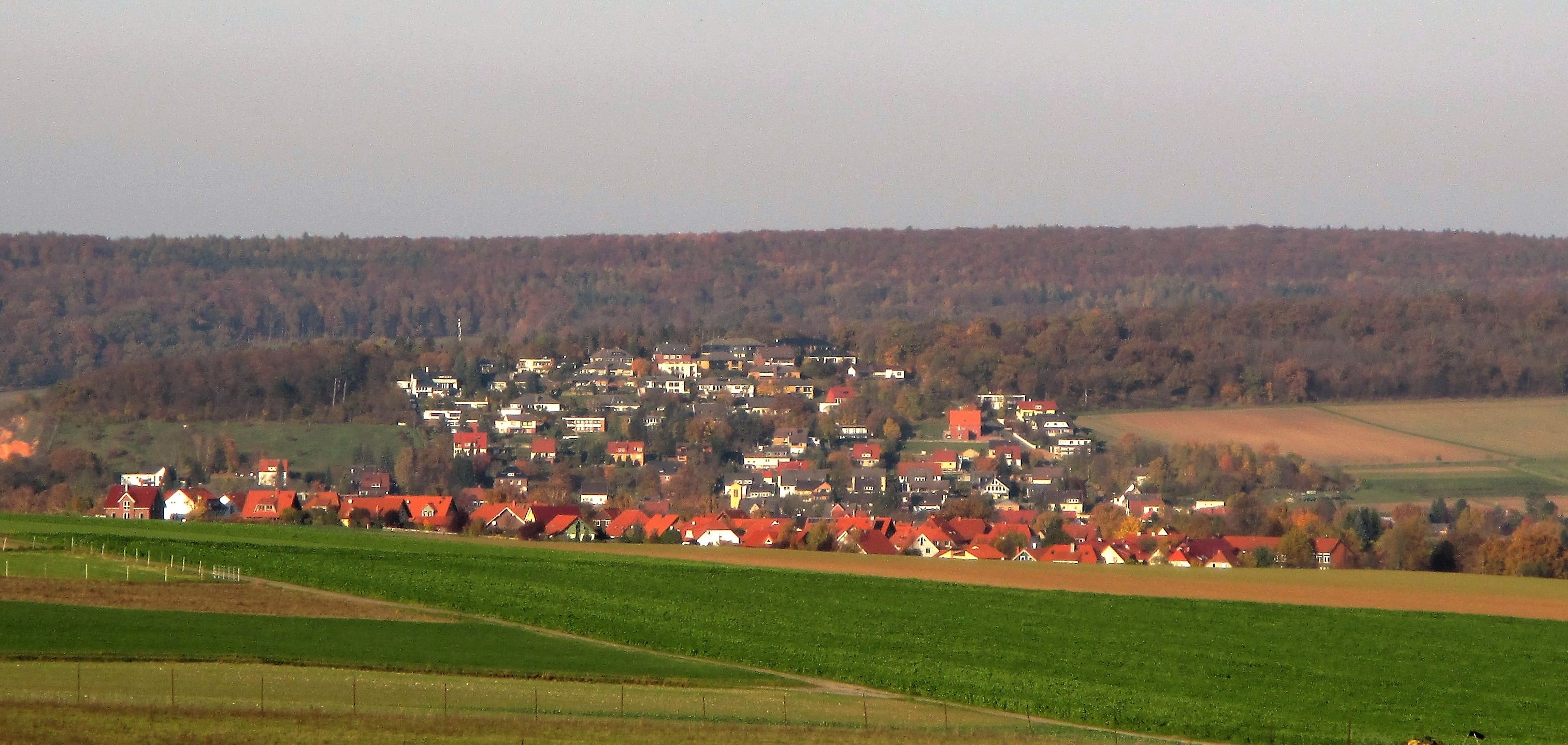 Blick auf Baddeckenstedt, Landkreis Wolfenbüttel